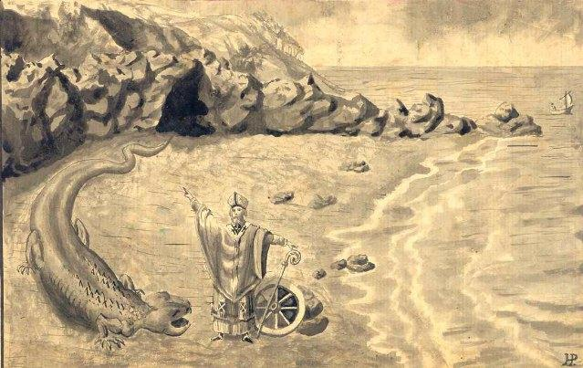 Saint-Germain-à-la-rouelle et le dragon Gravure ancienne